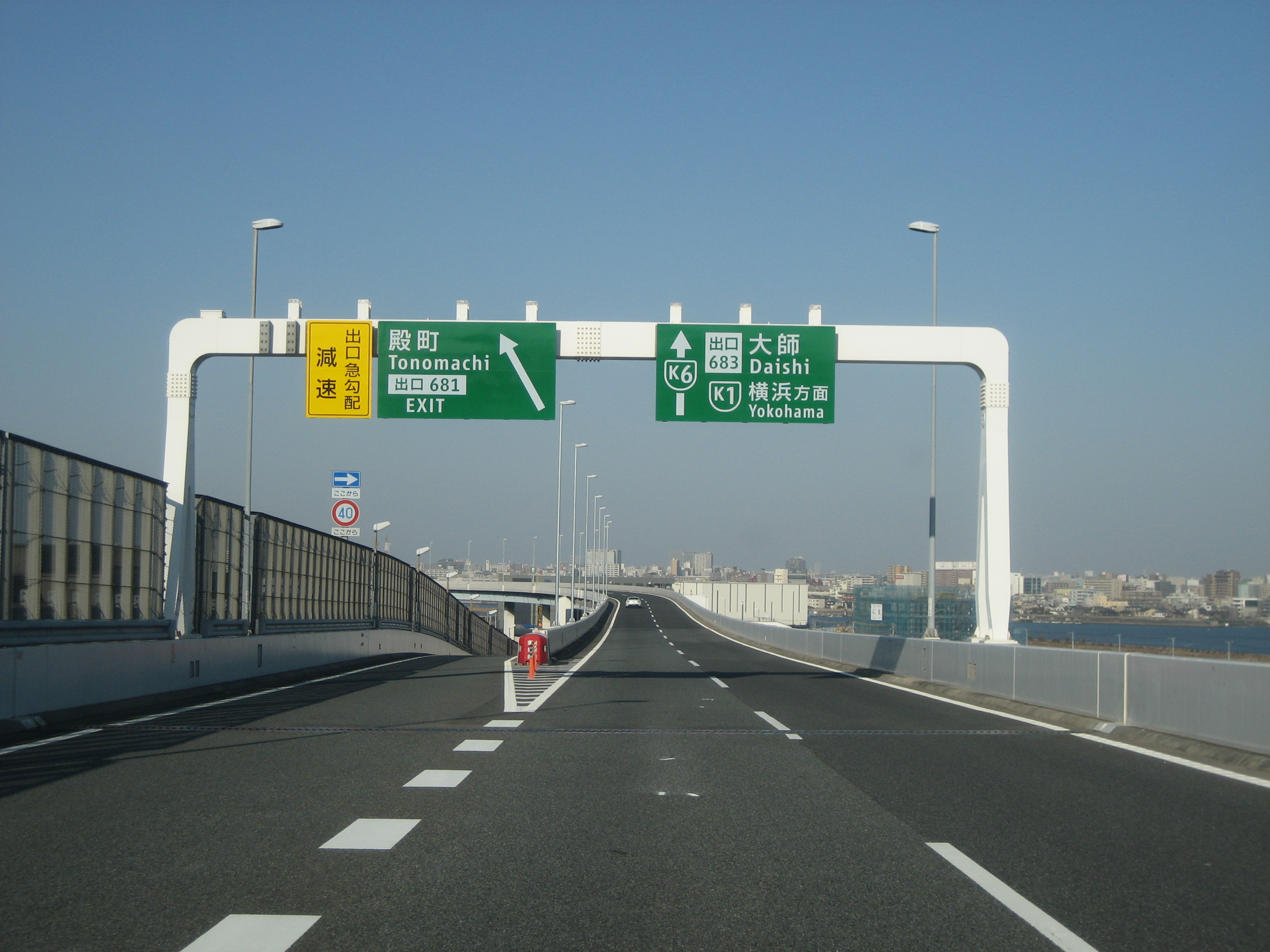 首都高速神奈川6号川崎線殿町出口付近